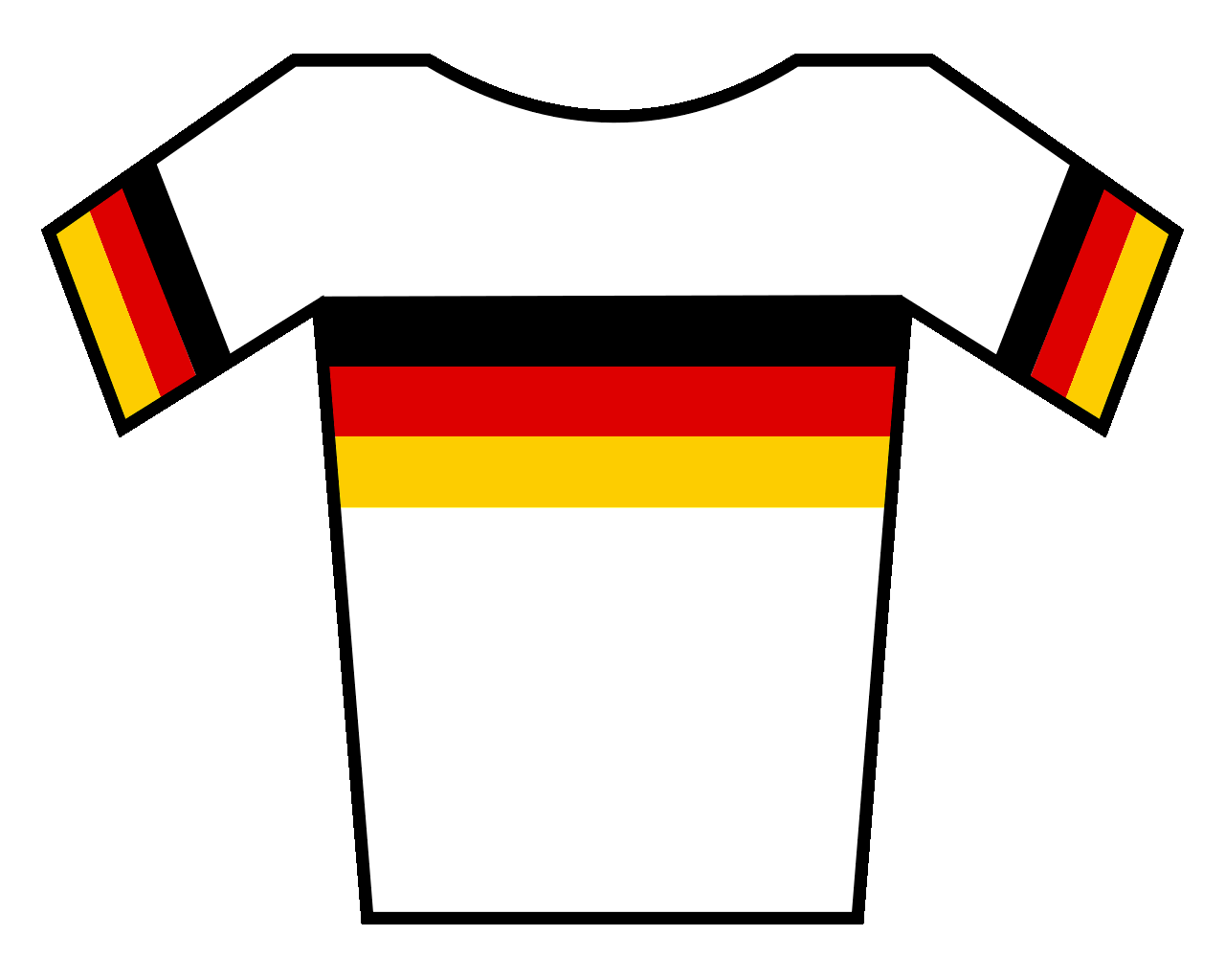 Maillot de Alemania